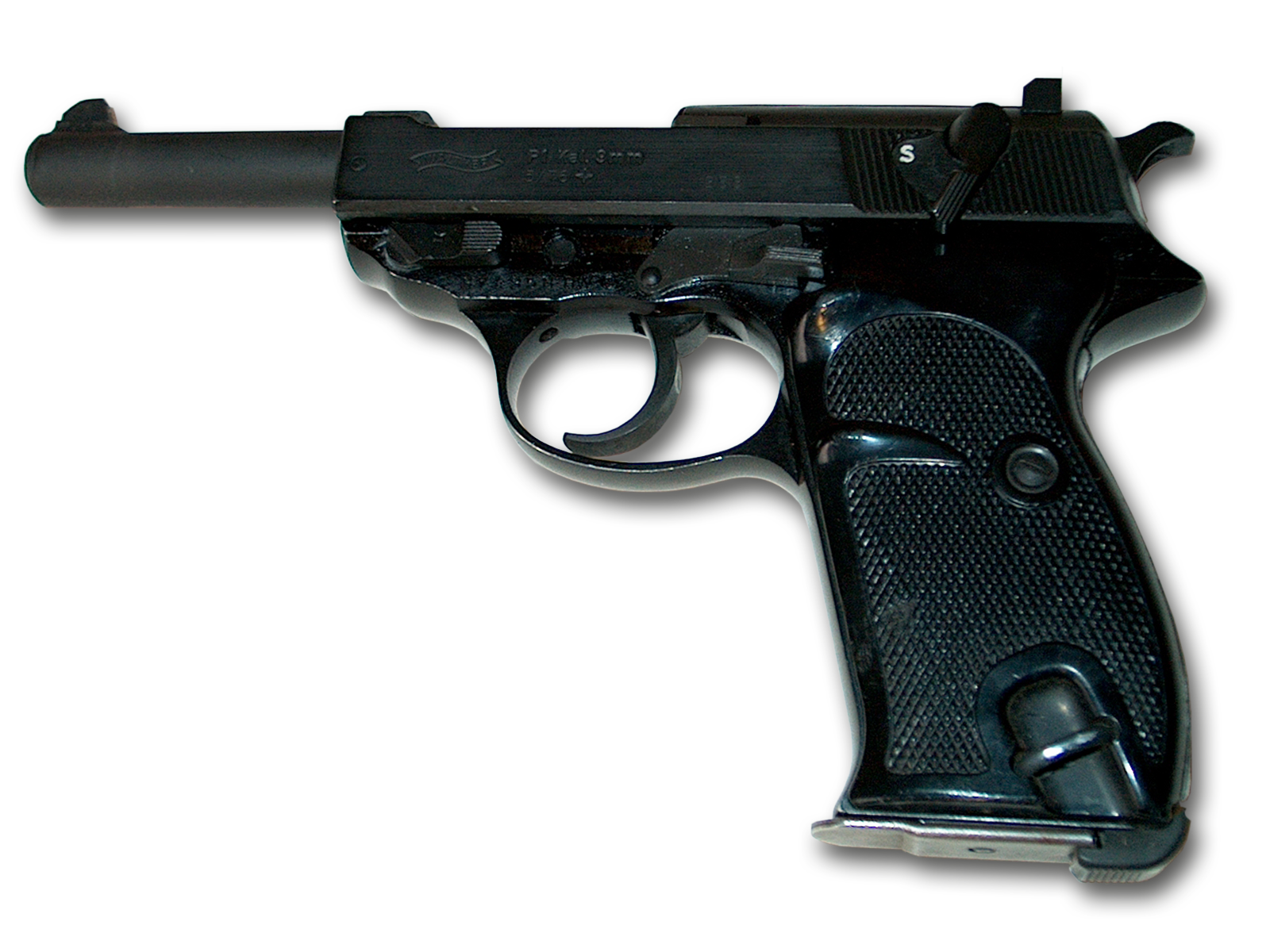 Die Pistole P1 der Bundeswehr